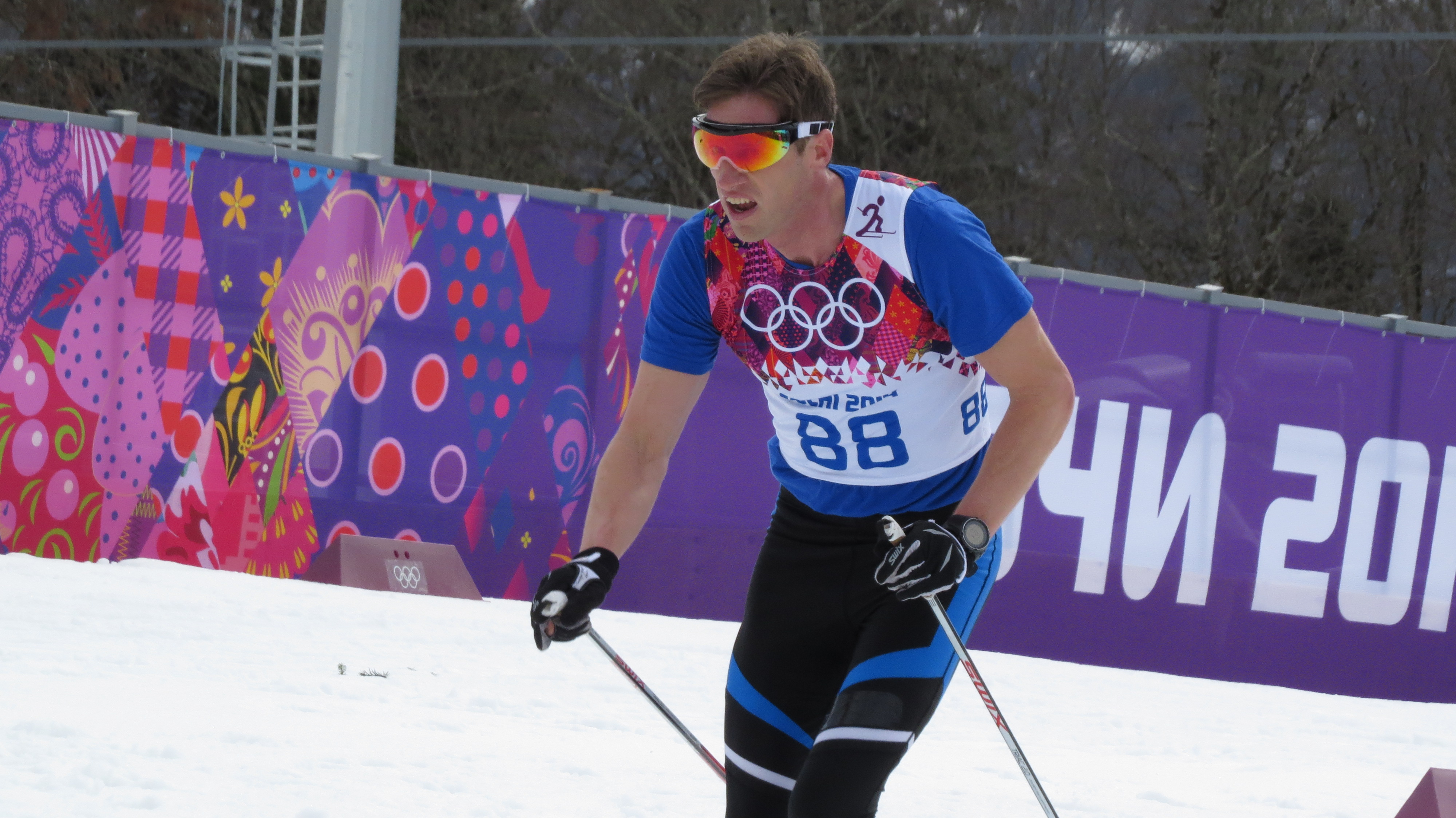 Лыжные гонки на зимних Олимпийских играх 2014 — 15 км классическим стилем (мужчины)